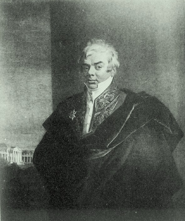 Павел Михайлович Ласунский (1777—14.12.1829) на фоне усадебного дома на Петергофской дороге.